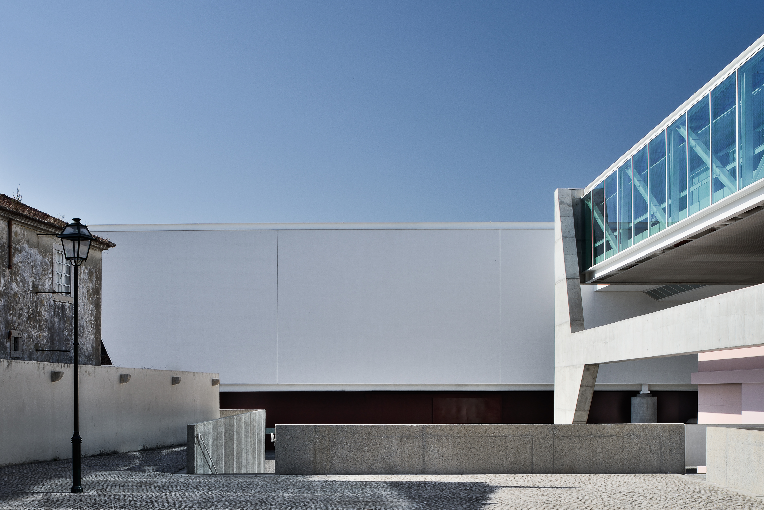 PMR, Museu Nacional dos Coches, Lisboa